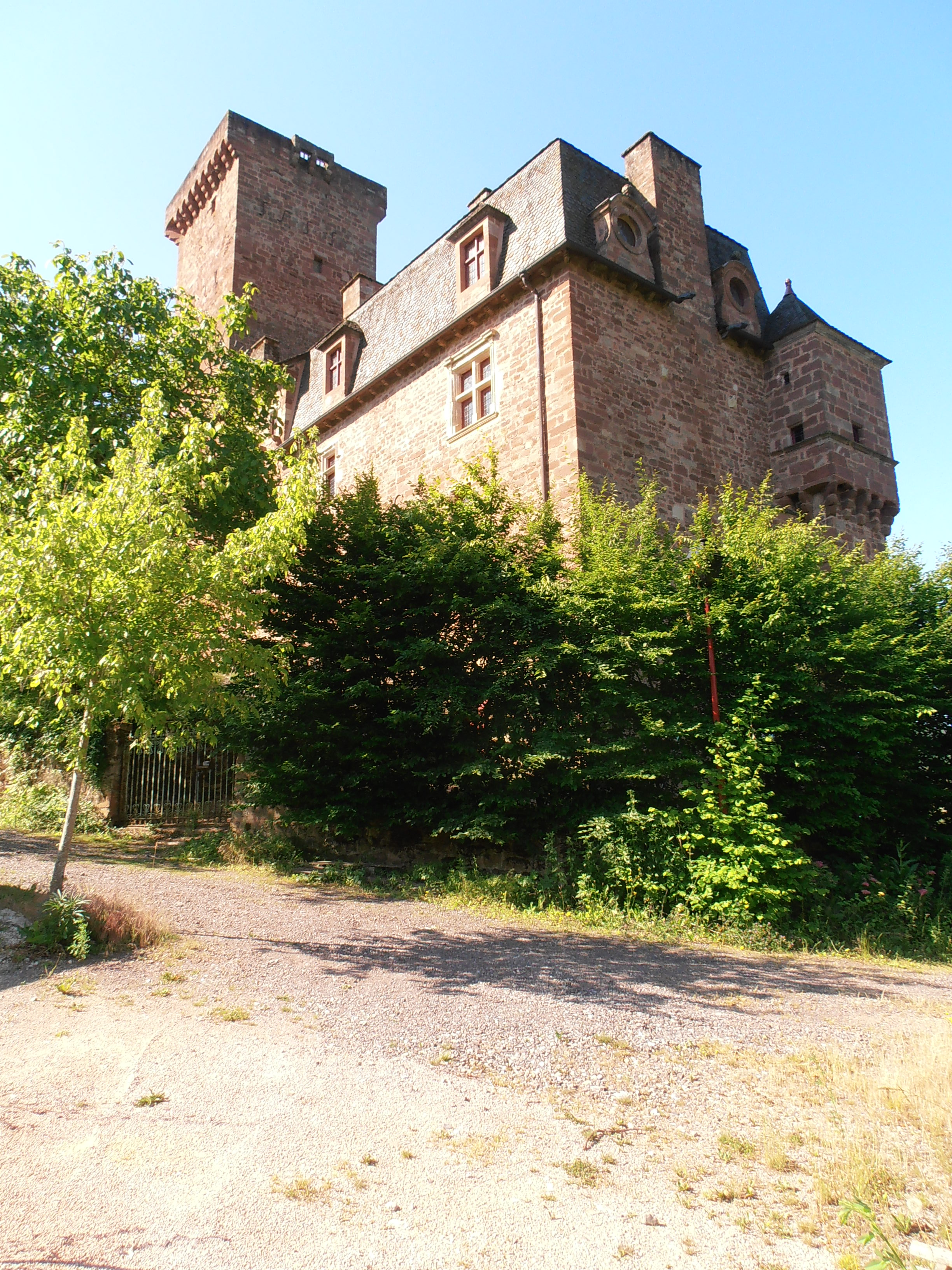 Château de la Servairie à Mouret .